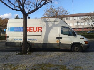 Vehículo de Seur